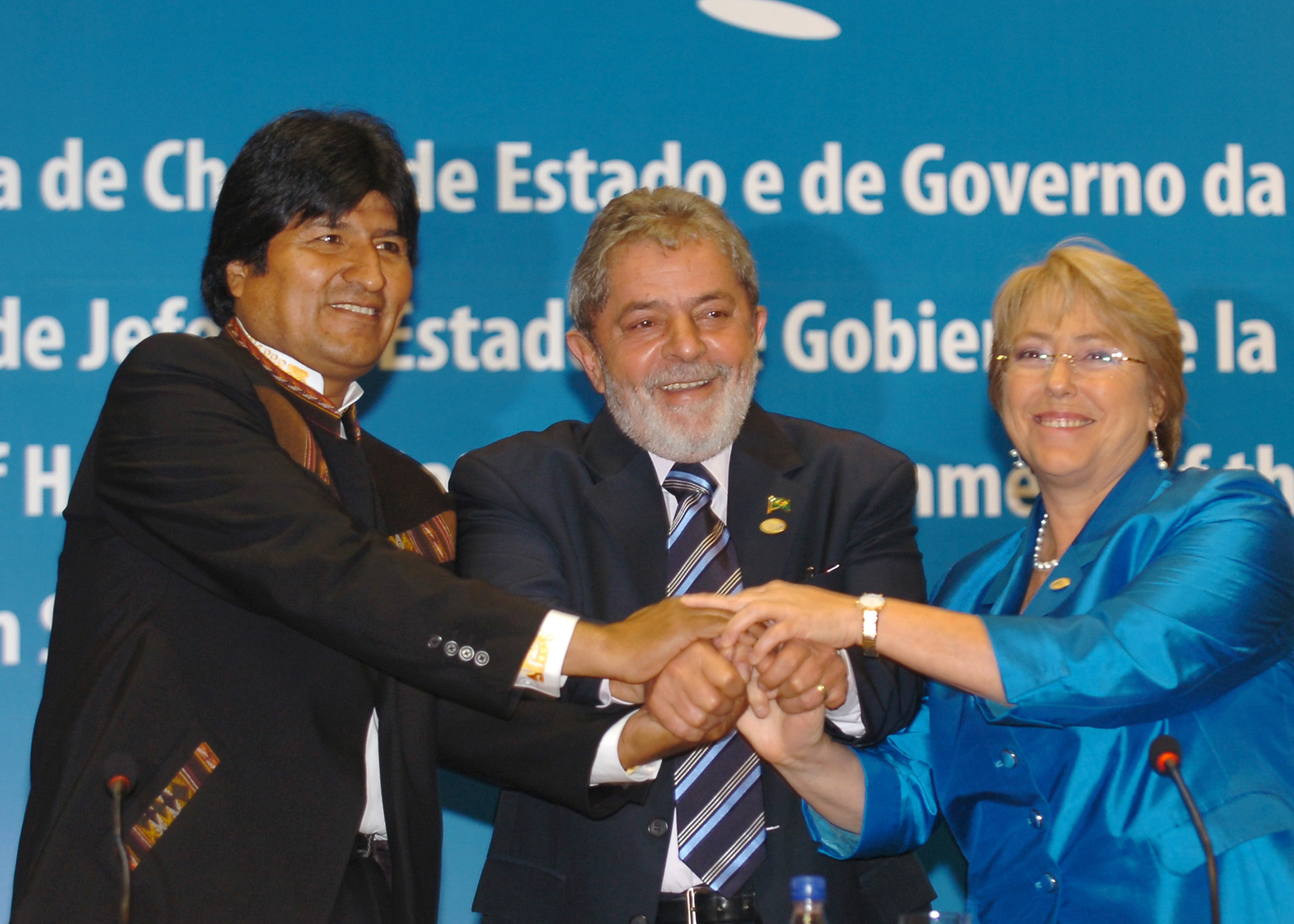 Brasília - Presidente Luiz Inácio Lula da Silva troca cumprimentos com os presidentes da Bolívia, Evo Morales, e do Chile, Michelle Bachelet, ao final da reunião de cúpula da União de Nações Sul-Americanas (Unasul).